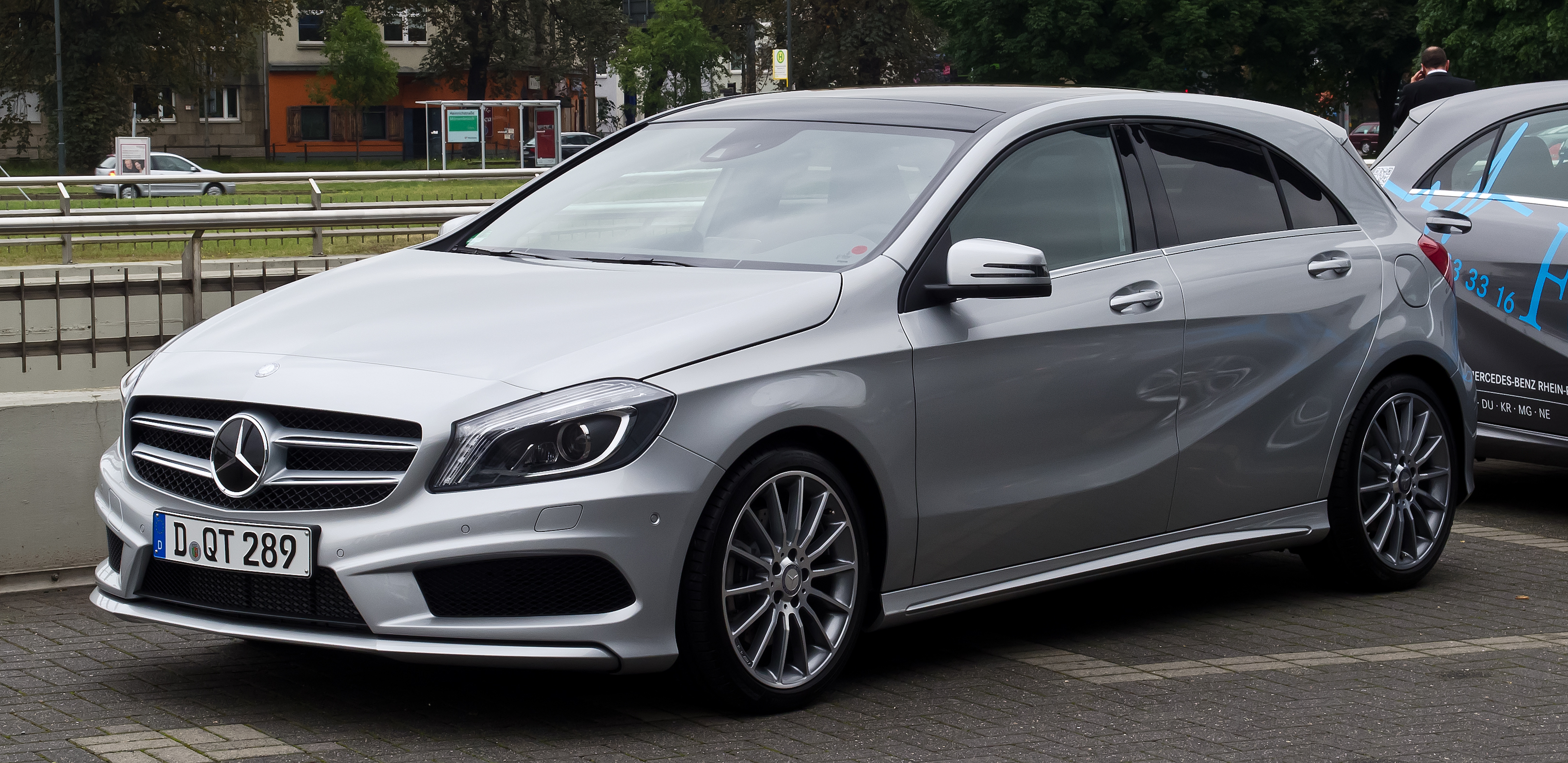 Mercedes-Benz A 250 BlueEFFICIENCY AMG Sport (W 176)